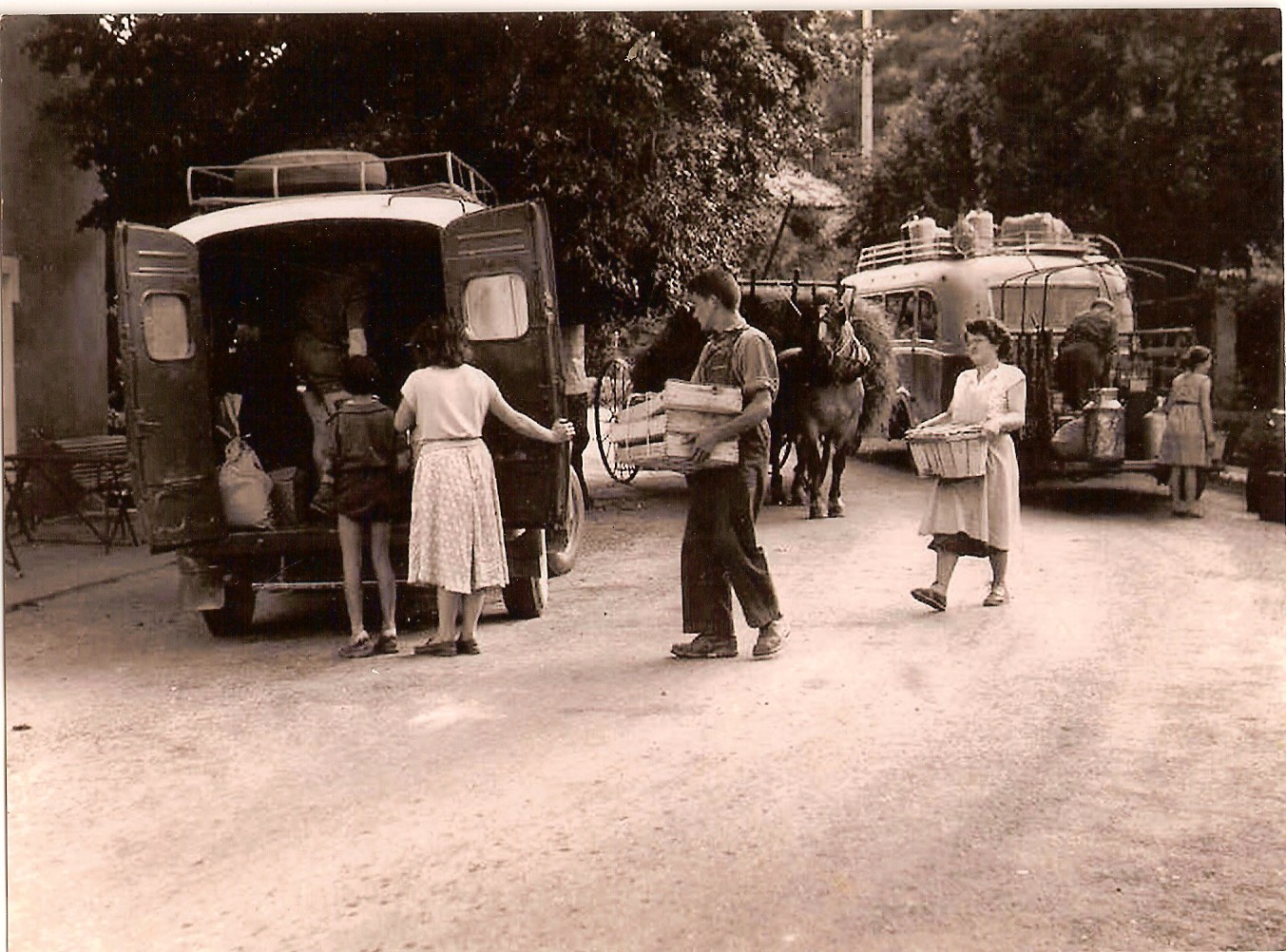 photographie en noir et blanc d'une scène de rue aux Bégües (commune de Sainte Colombe - 05)